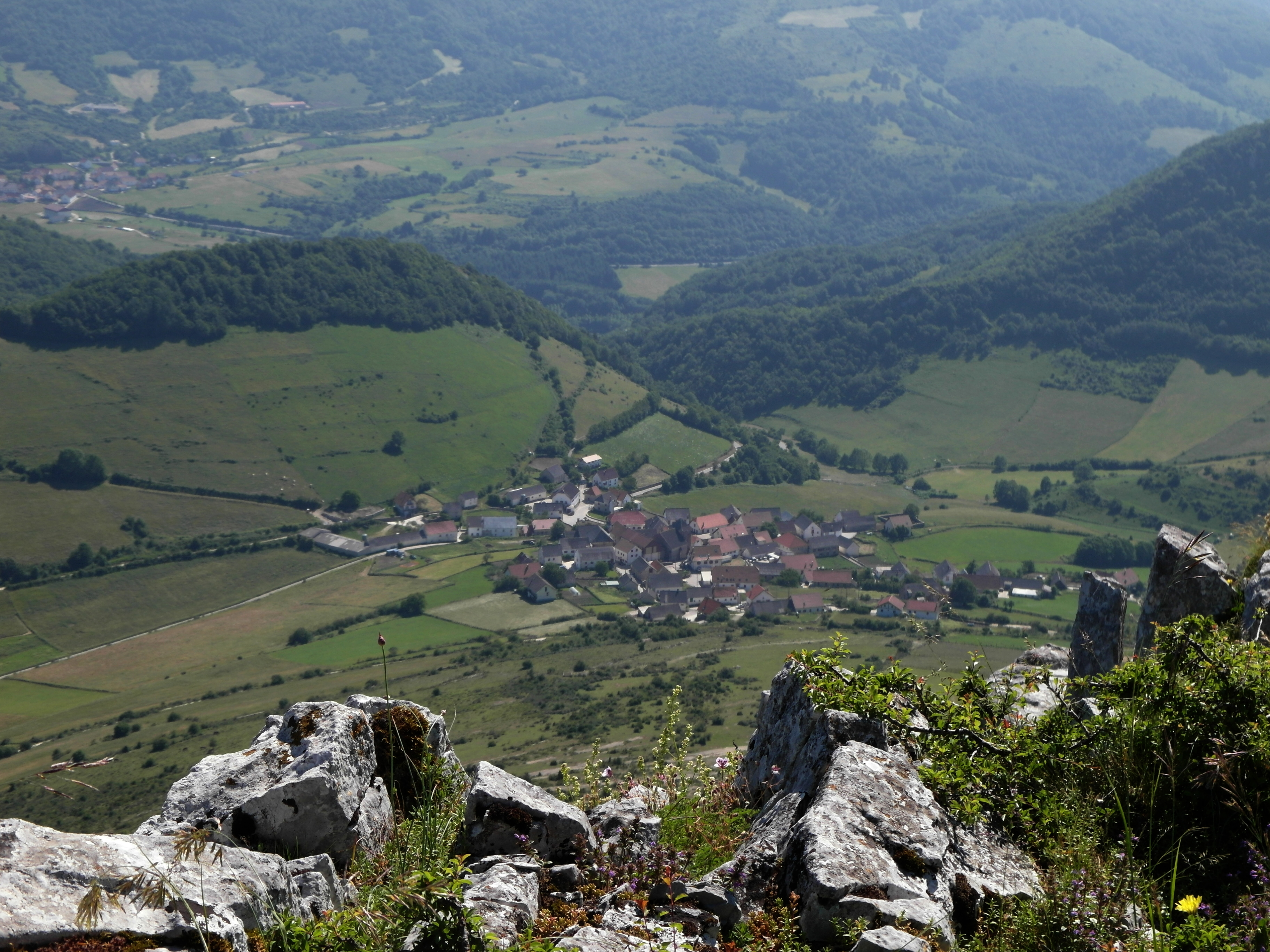 Villanueva de Aézcoa desde el pico Berrendi.